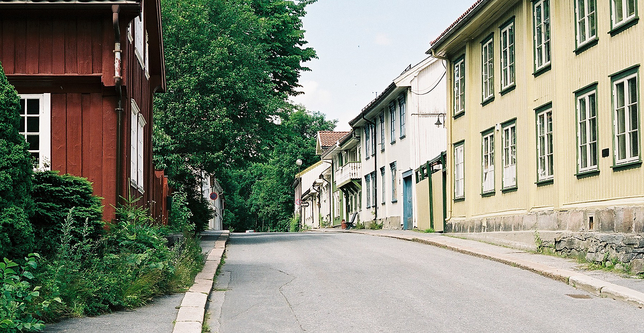 Hyttegata, Kongsberg, Norway.